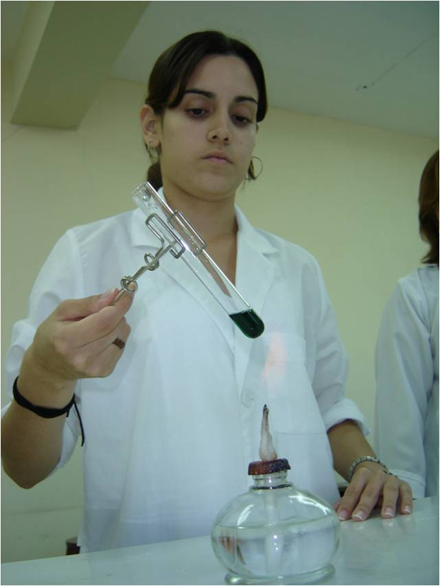 ESTUDIANTE INTEC